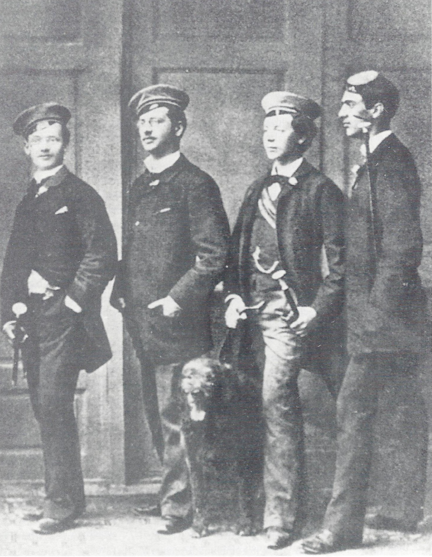 Angehörige der Wiener akademischen Burschenschaft Albia: Karl Becke, Hans Pischek, Franz G. Staerk und Theodor Herzl (ganz rechts, mit Mensurpflaster).